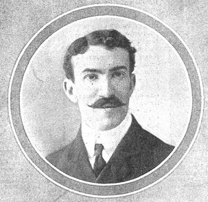 Retrato del escritor y periodista Luis Bello, obra de Manuel Compañy, recogido en la revista española Mundo Gráfico.